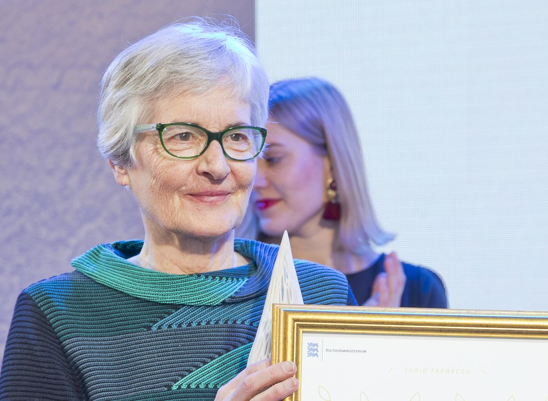 Turid Farbregd, aasta kultuurisõber 2017